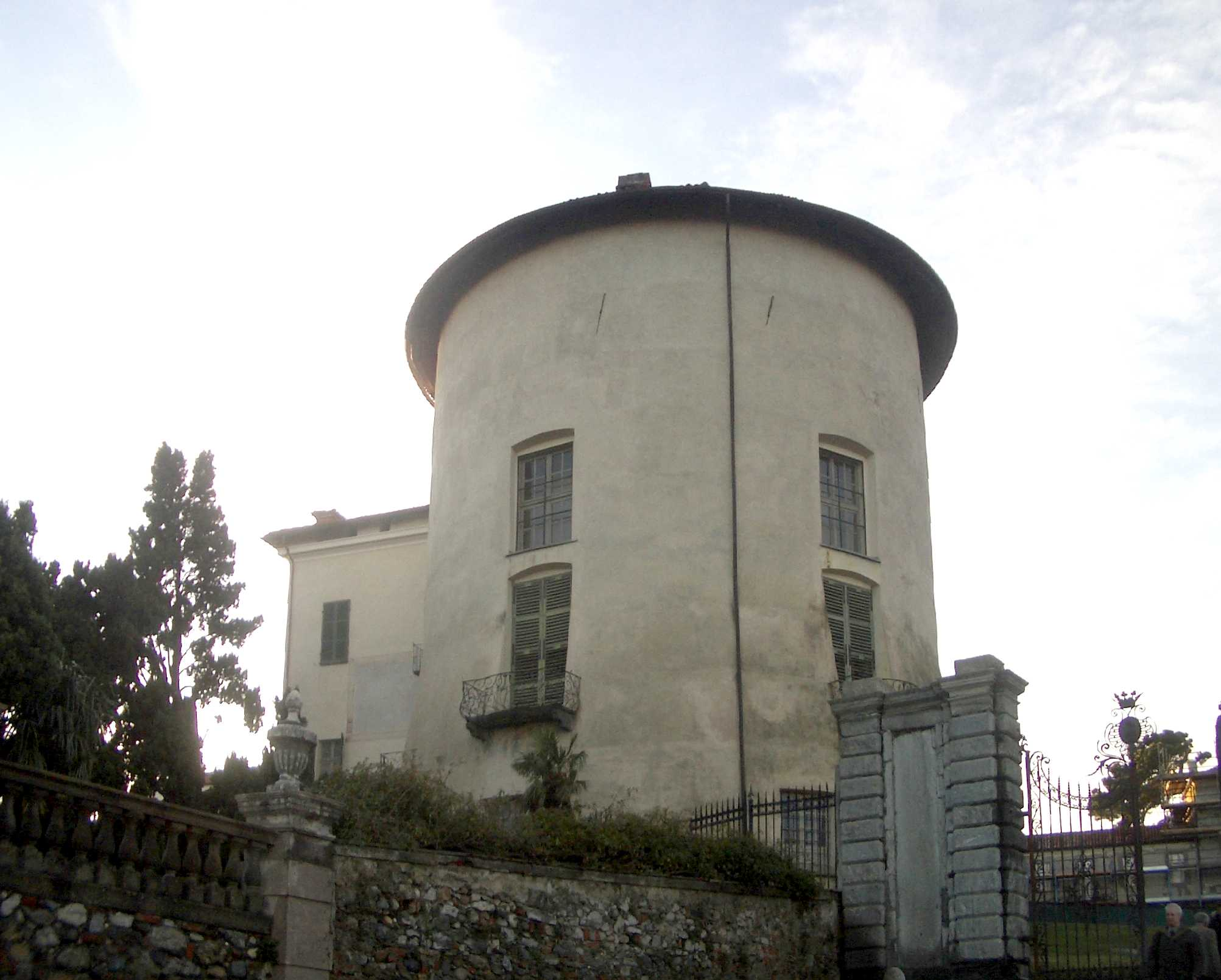 Castello di Masino, Caravino, Torino, Italy